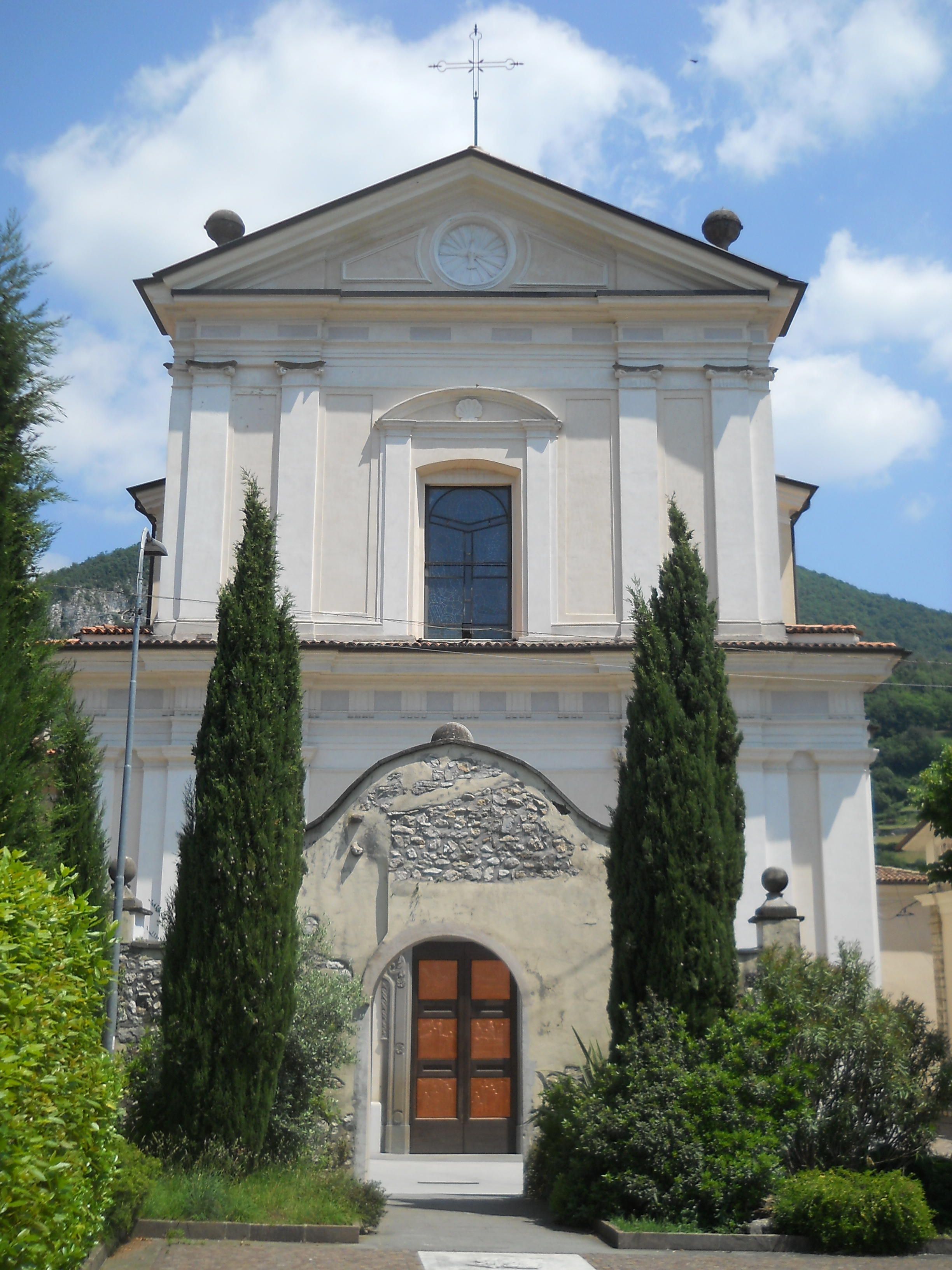 Facciata della chiesa parrocchiale di Adrara San Martino